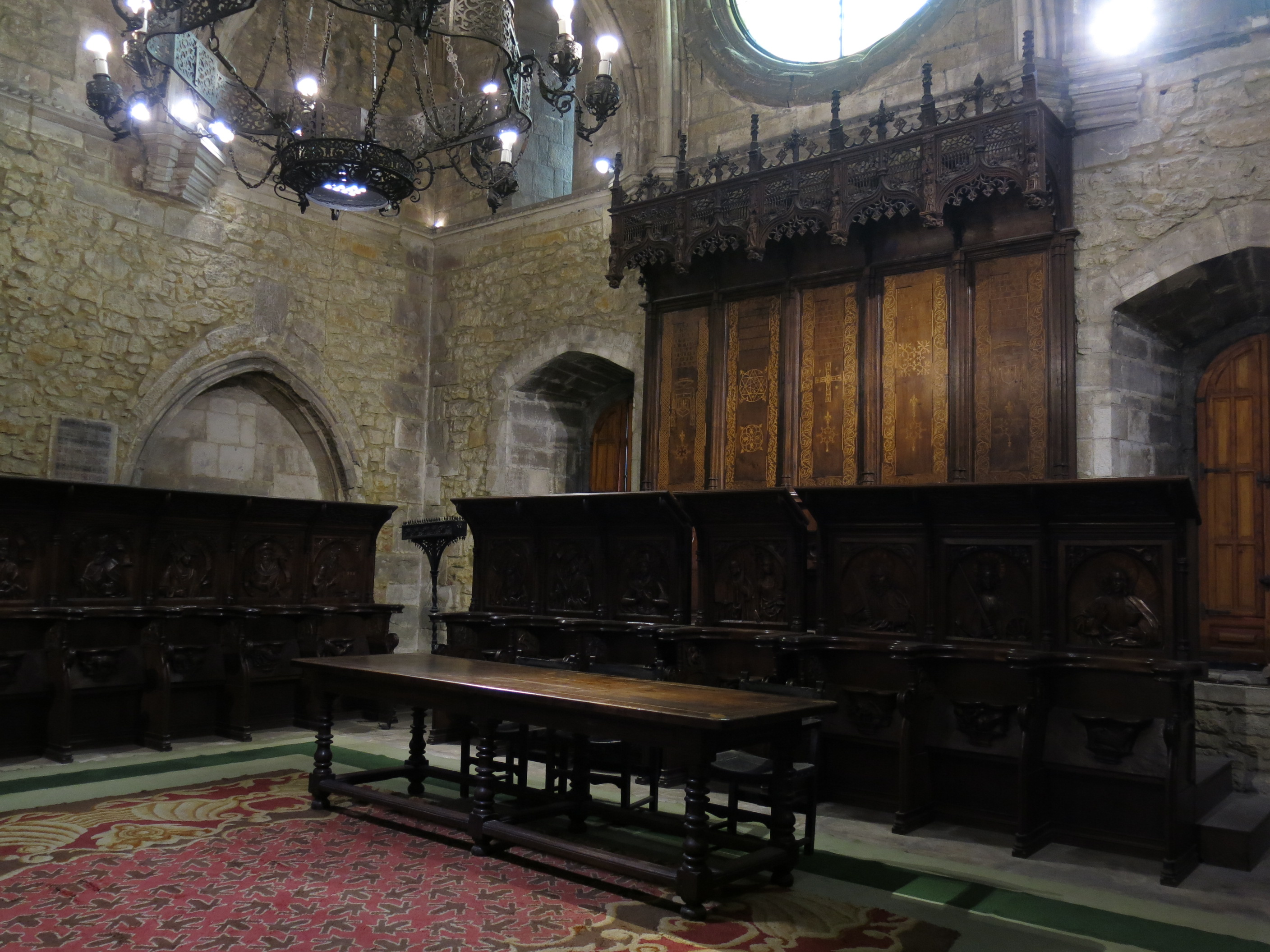 Catedral de San Salvador